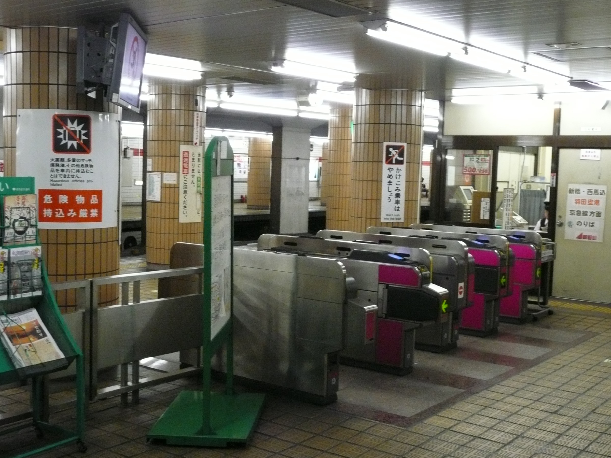 宝町駅1番ホーム側改札口